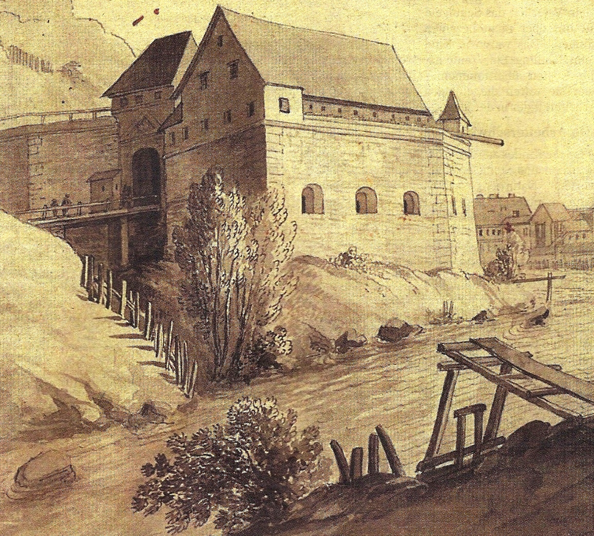 Drittes Sacktor, um 1801, Feder lavriert von Johann Wachtl